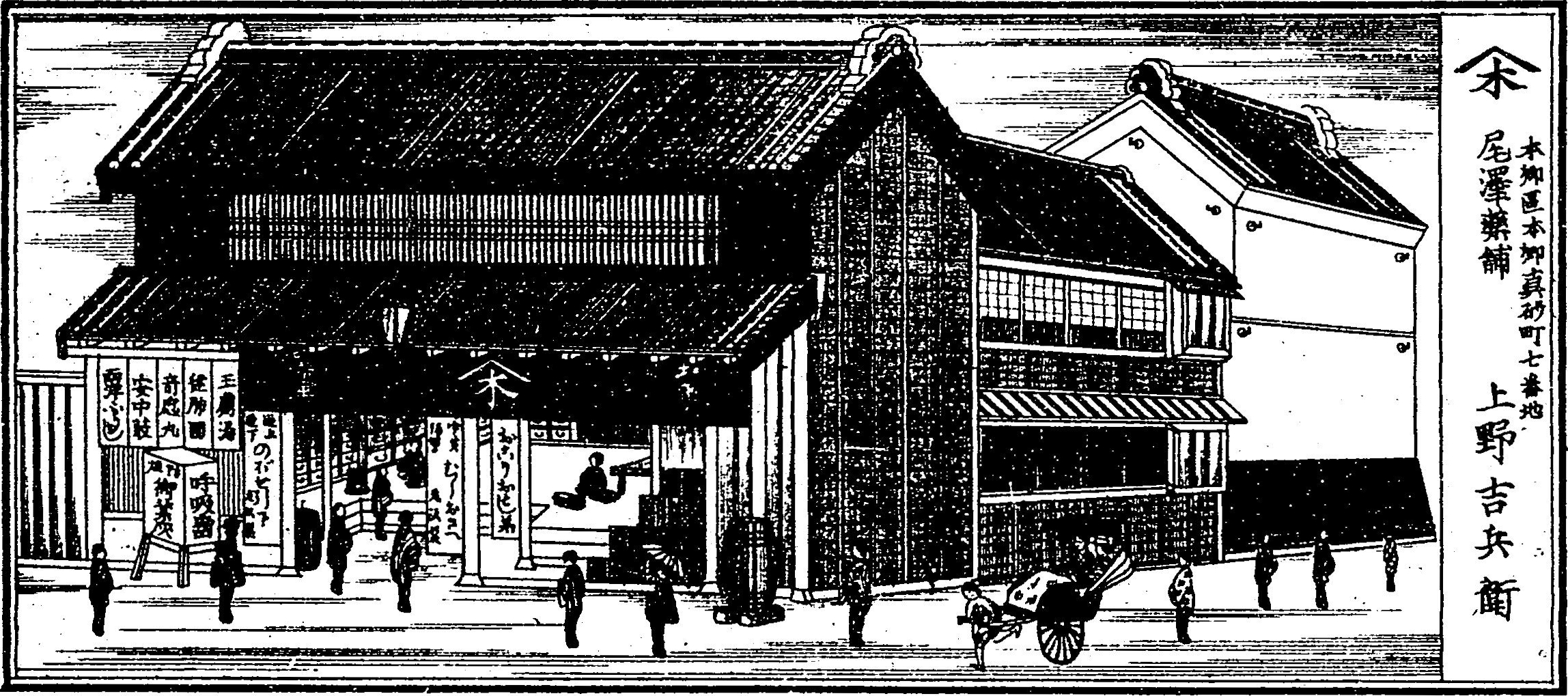 吉田保次郎編輯『東京名家繁昌圖錄』初編、吉田保次郎、1883年。